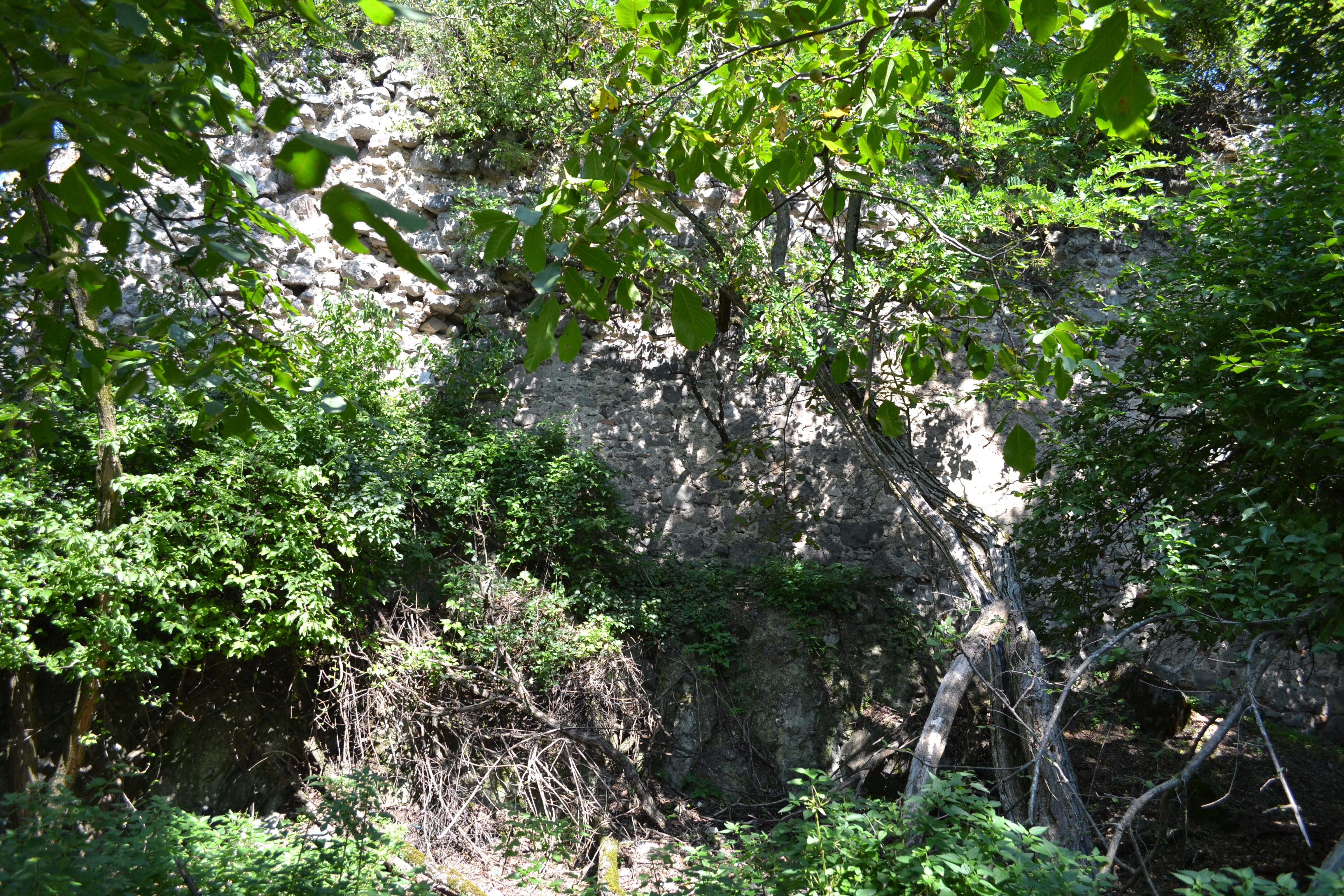 Ruiny stredovekého hradu Blh zo začiatku 14. storočia v nadmorskej výške 531 m. Dnes je súčasťou Zvernice Teplý Vrch.